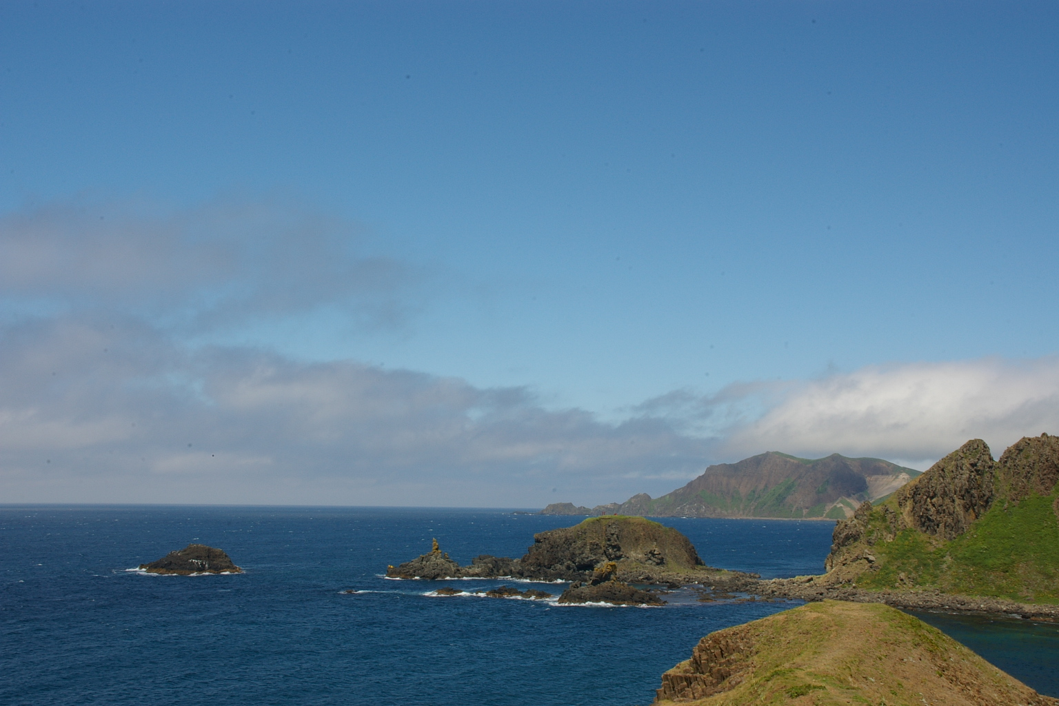 Cape Sukai, Rebun island hokkaido.